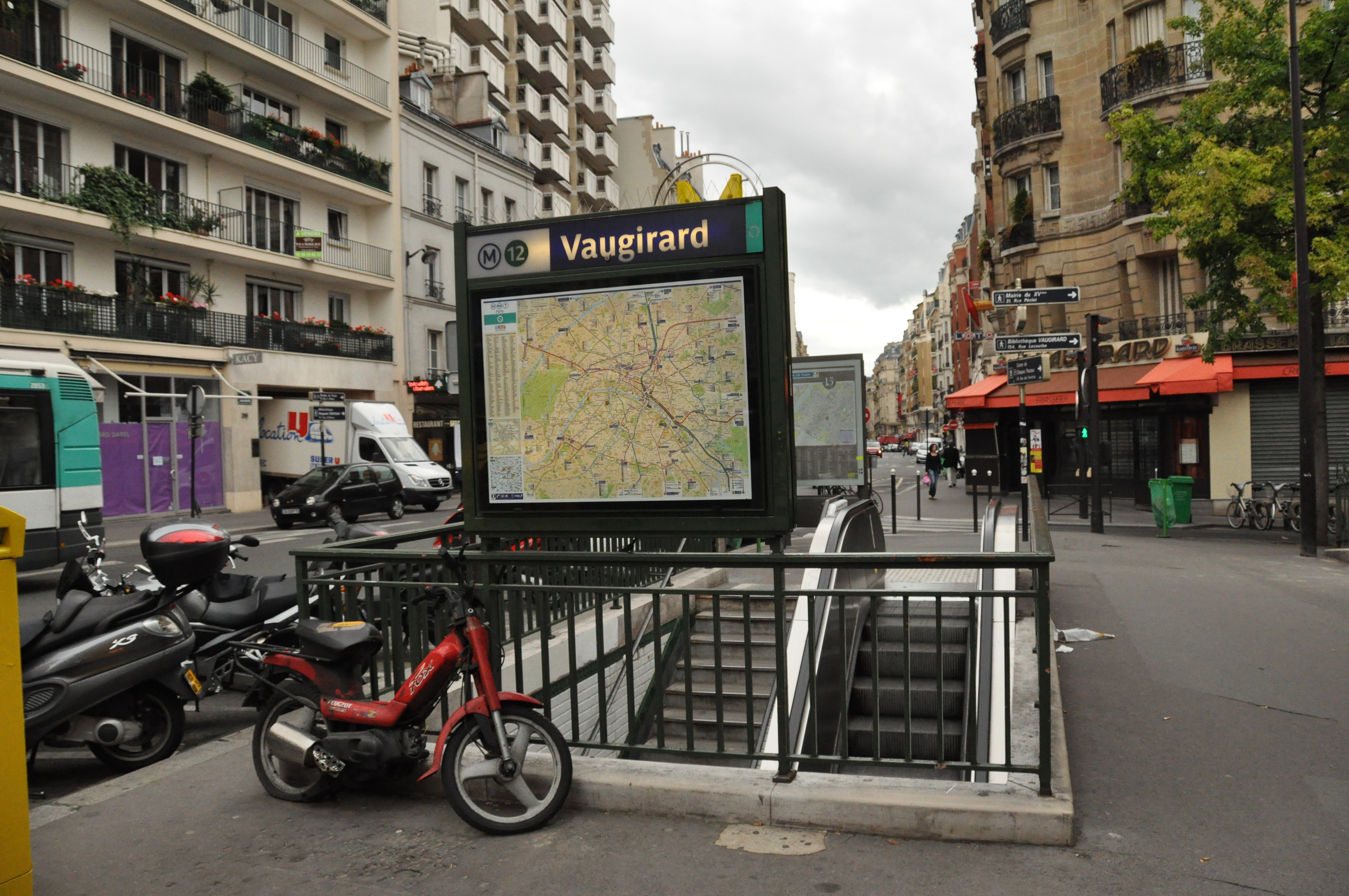 Accès de la station de métro Vaugirard sur la ligne 12 du métro de Paris